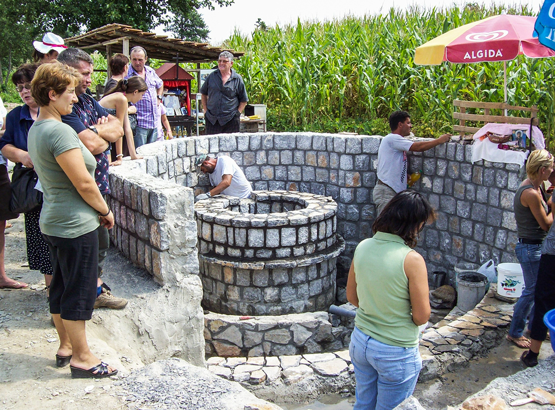 Манастир Света Богородица-Ложани, со извор на света вода